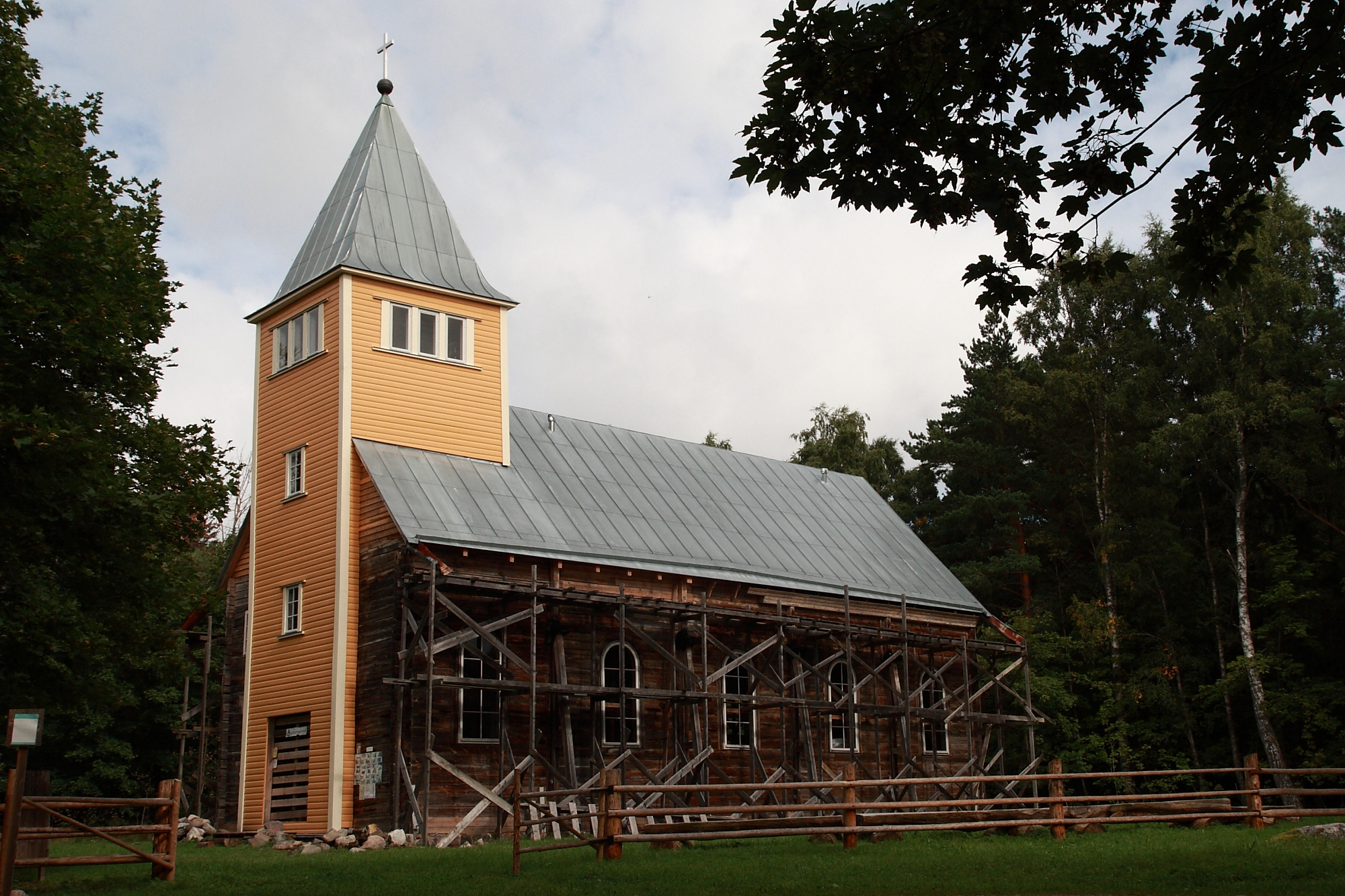 Naissaare kirik